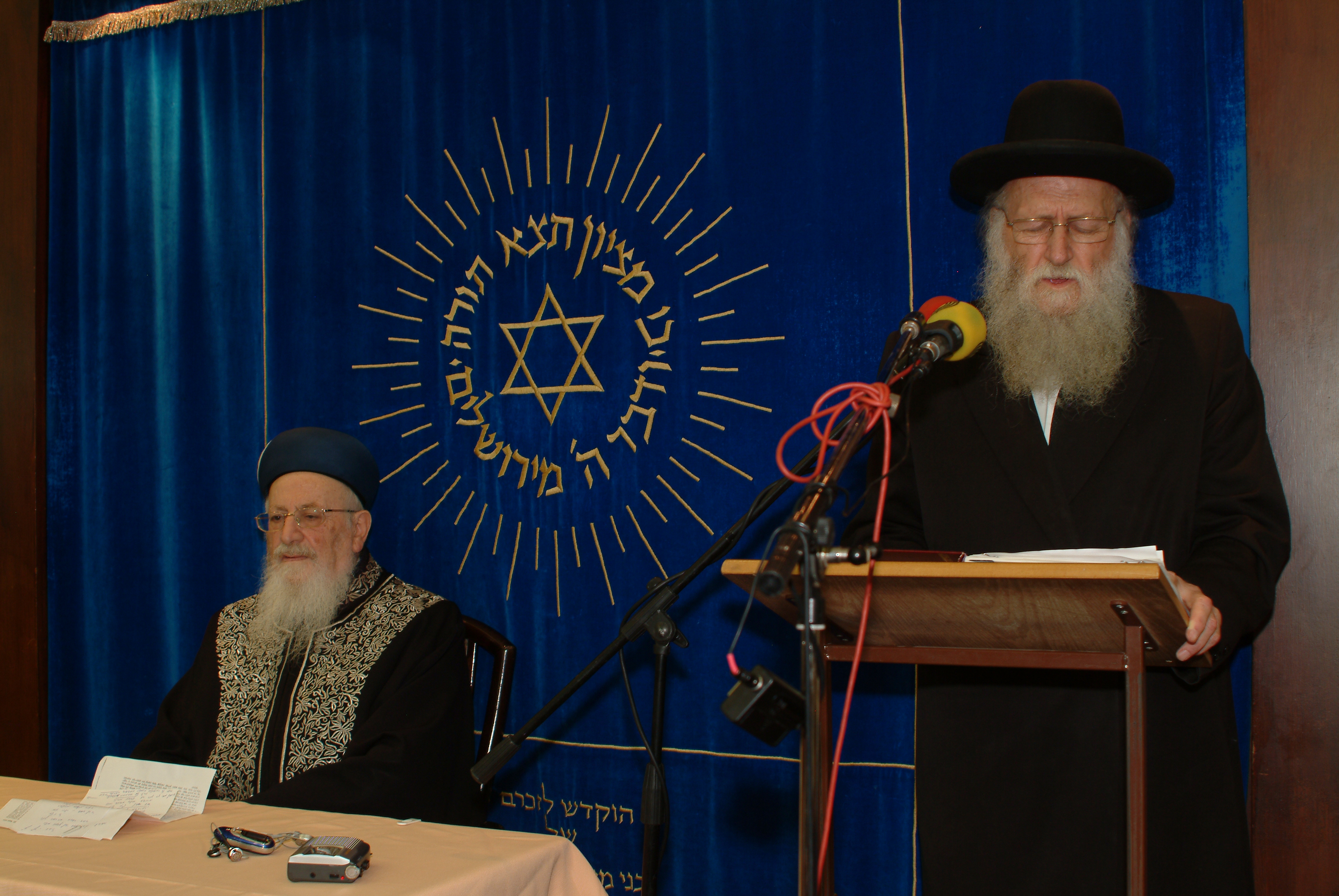 הרב שמחה קוק נואם בישיבת מרכז הרב